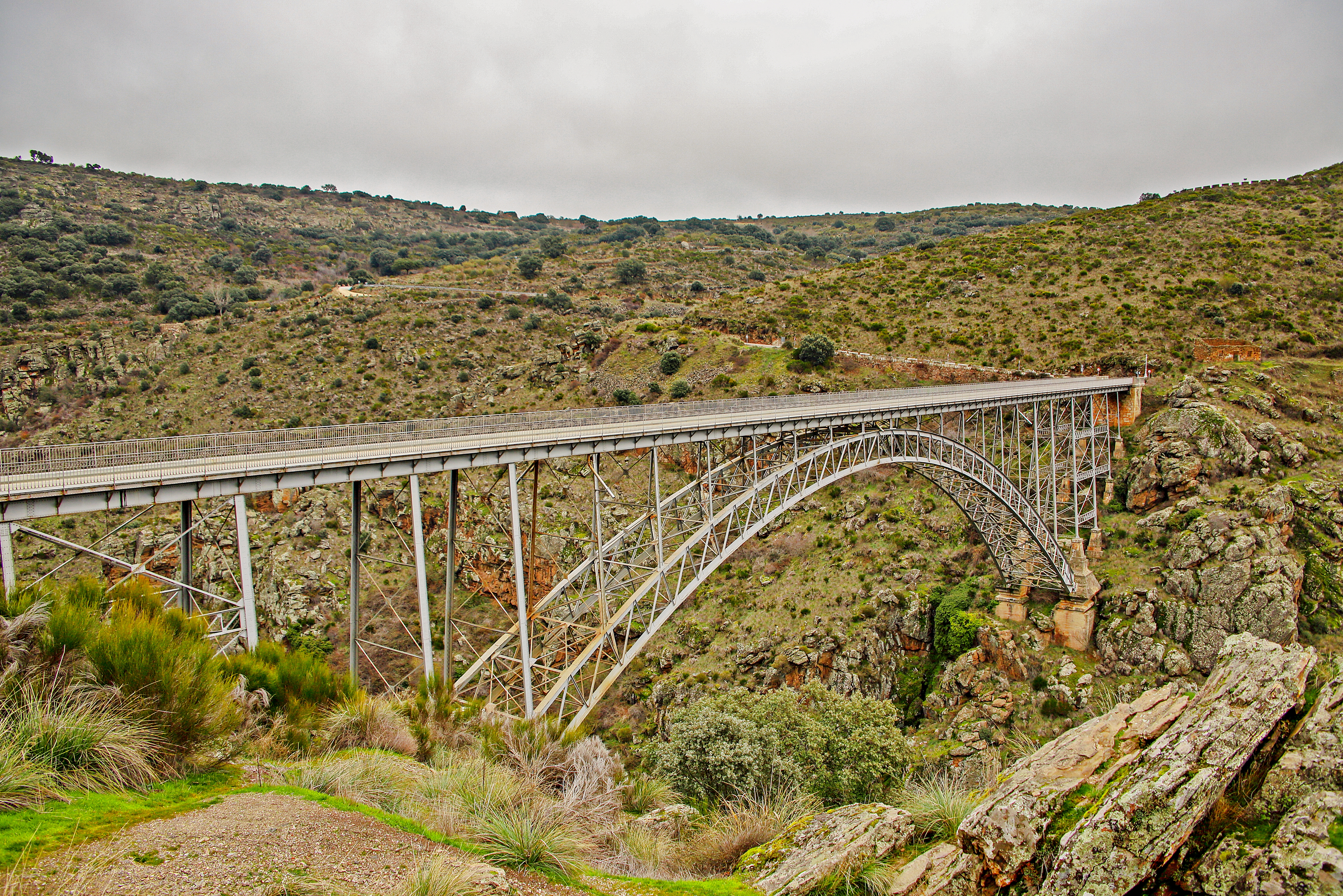 Puente de Requejo se sitúa en la ZA-321, entre las localidades de Villadepera y Pino del Oro.